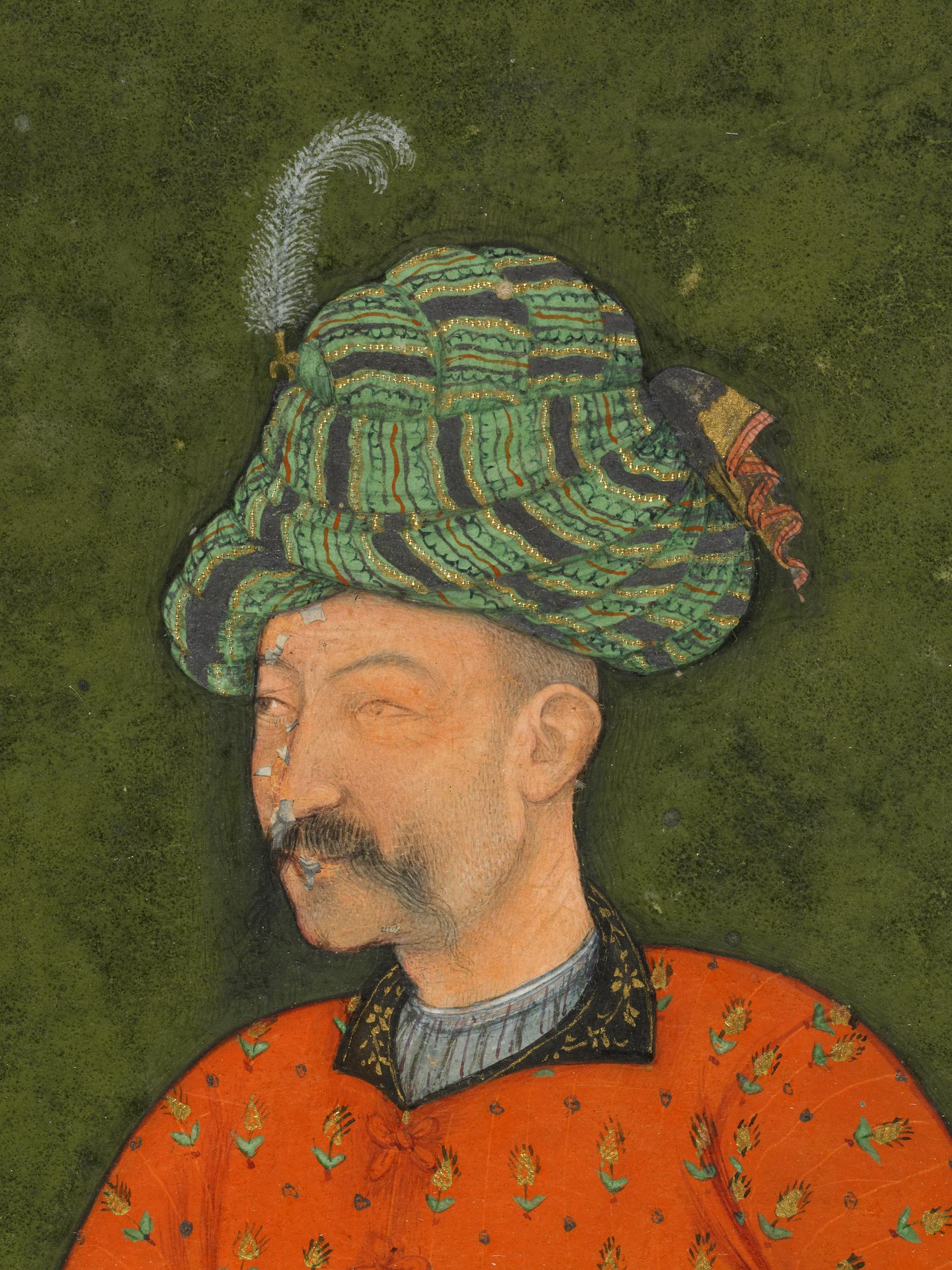 این اثر هنری بخاطر به این دلیل که اولین انتشارش قبل از ۱ ژانویهٔ ۱۹۲۳ روی داده است هم‌اکنون در سراسر جهان در مالکیت عمومی قرار دارد و استفاده از آن آزاد است. بنابراین تکثیر آن در ایالات متحده آمریکا، آلمان و بسیاری کشورهای دیگر آزاد است.